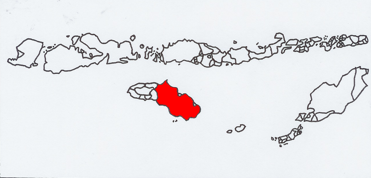 Kamberase taalgebied tussen de andere talen van het Indonesische gedeelte van de Kleine Soenda-eilanden. Eigen werk, vrij voor het publiek.